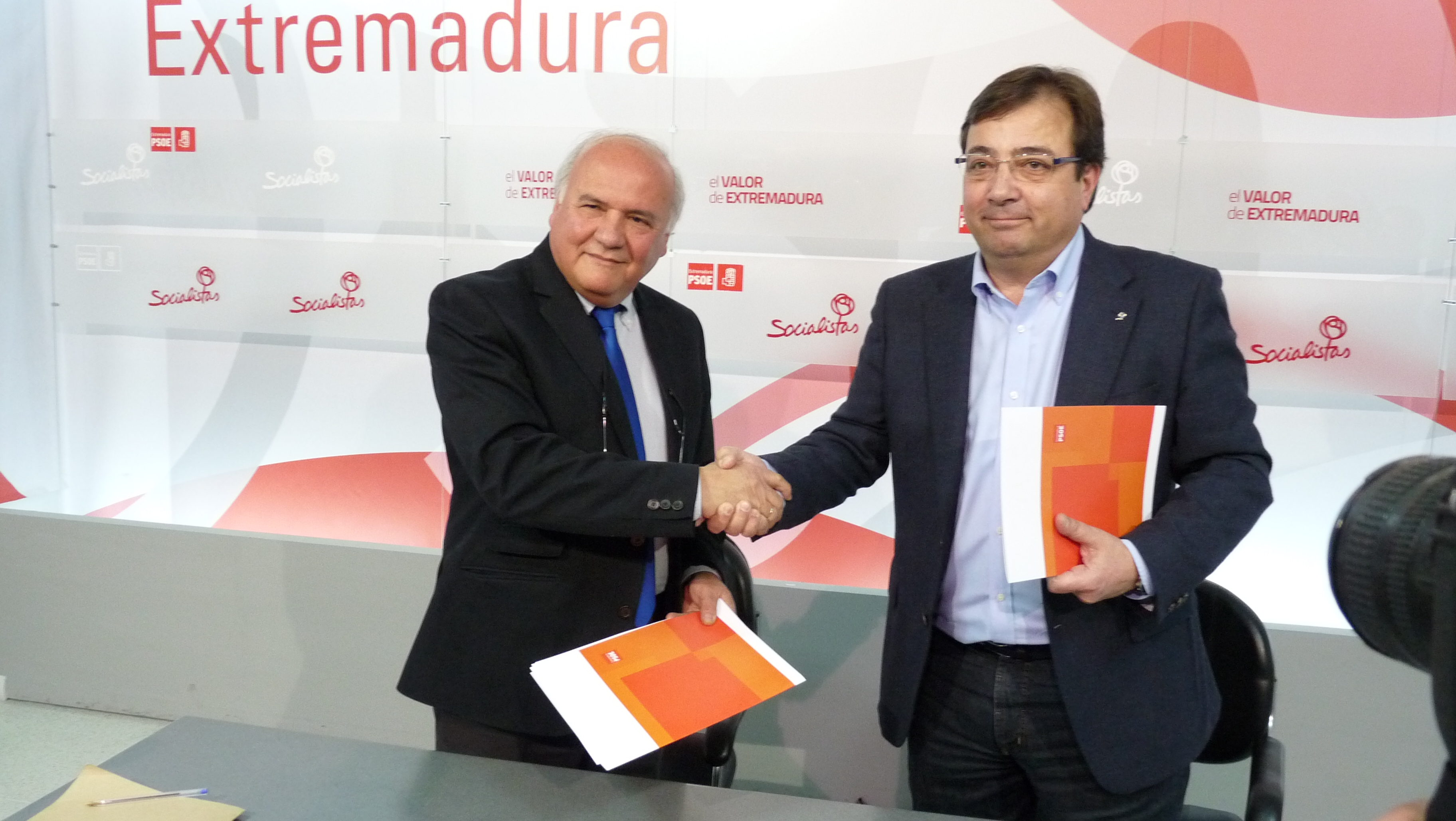 El secretario general del PSOE de Extremadura, Guillermo Fernández Vara, y el secretario general de SIEX, José Antonio Jiménez firman el acuerdo para concurrir de manera conjunta a las elecciones autonómicas de mayo próximo